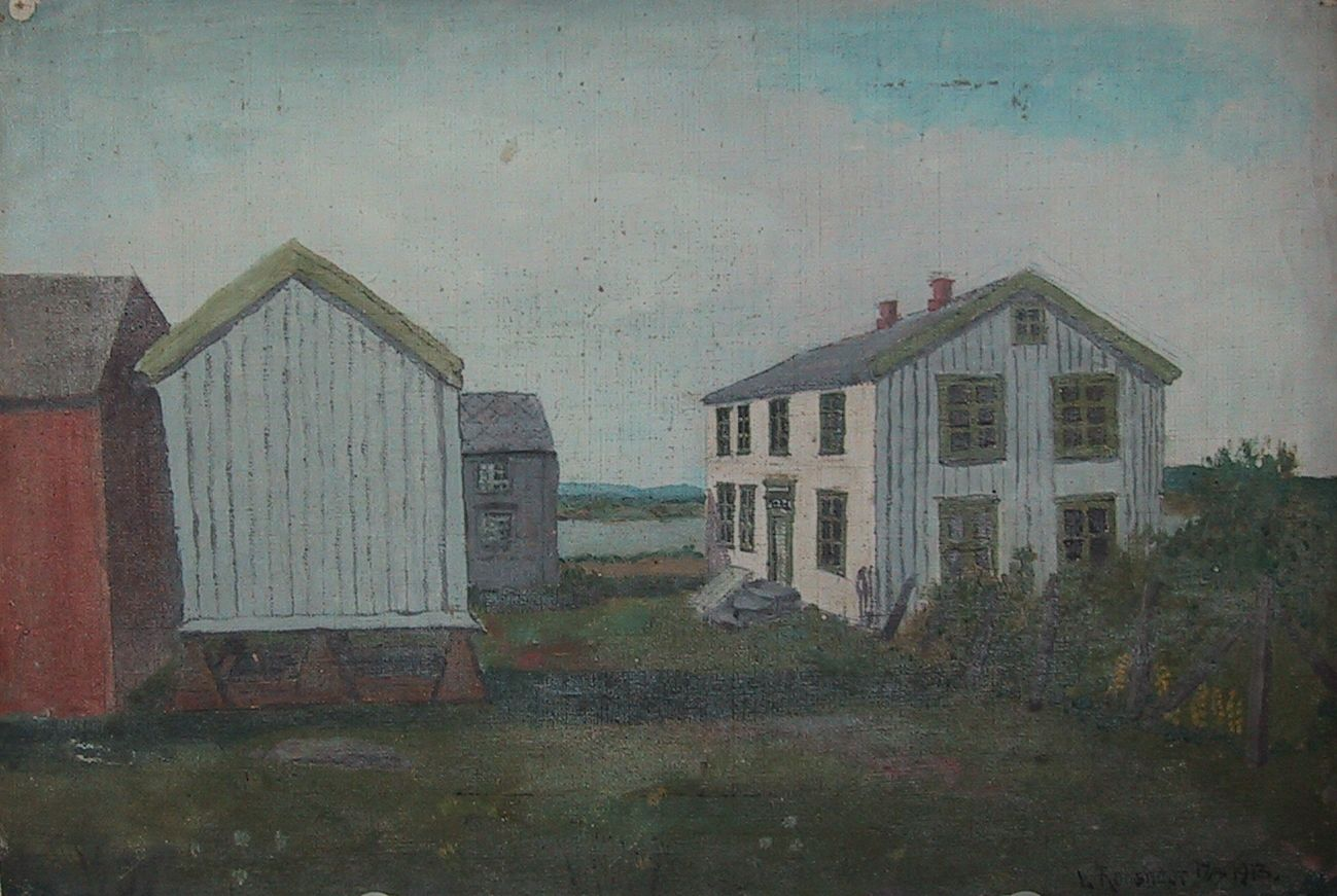 gården Nestun Røkke på Skatval.